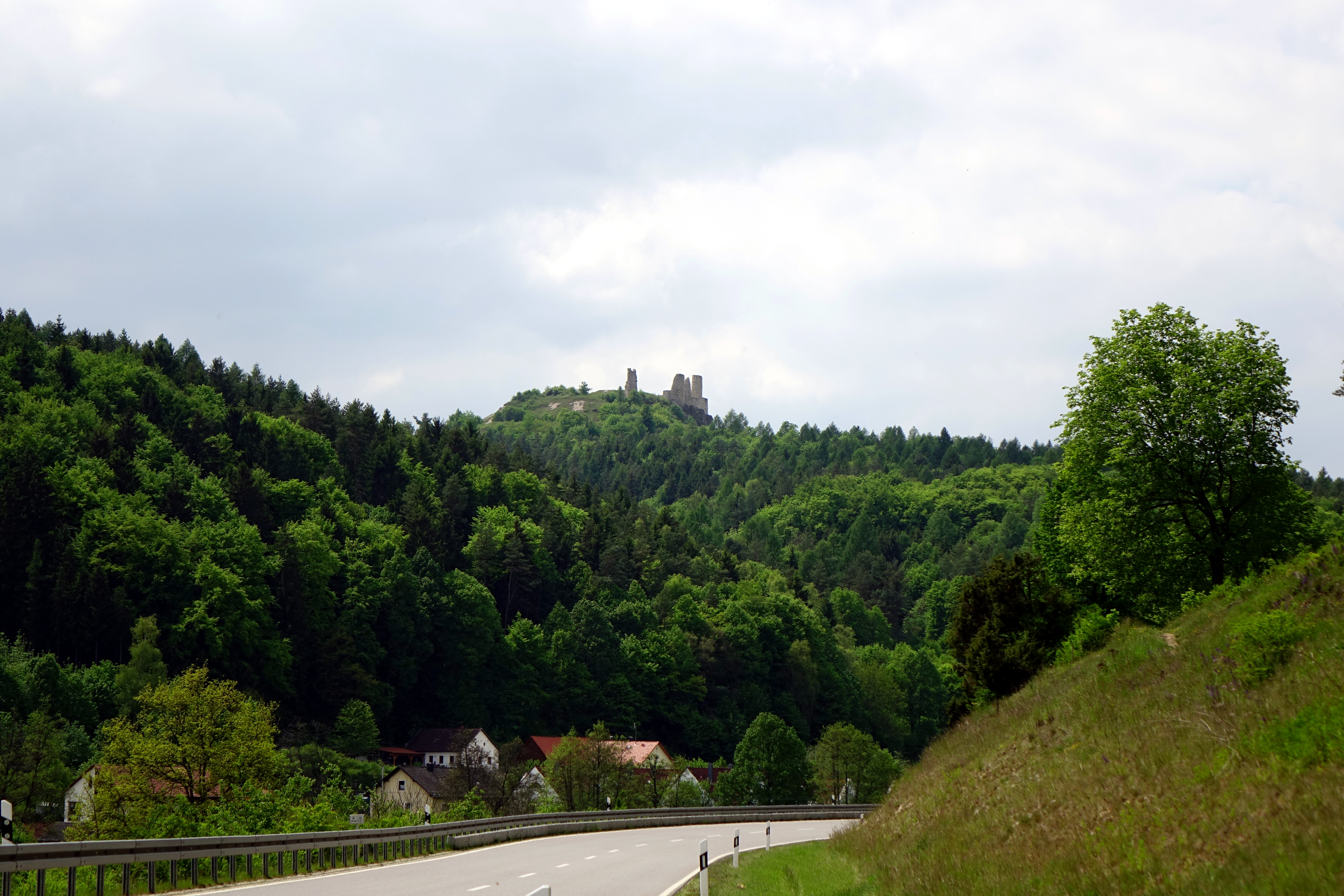 (FFH:BY-6636-301)_Fledermausquartiere um Hohenburg Die Hohenburg im Naturpark Hirschwald. Hier wohnt die Große Hufeisennase